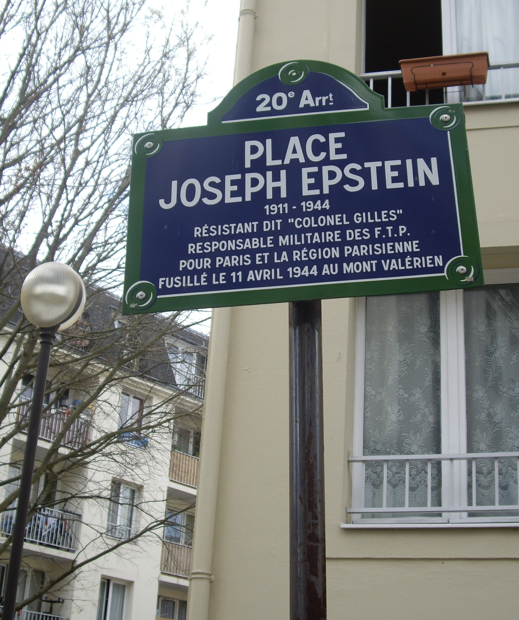 Place Joseph-Epstein, Paris 20e.